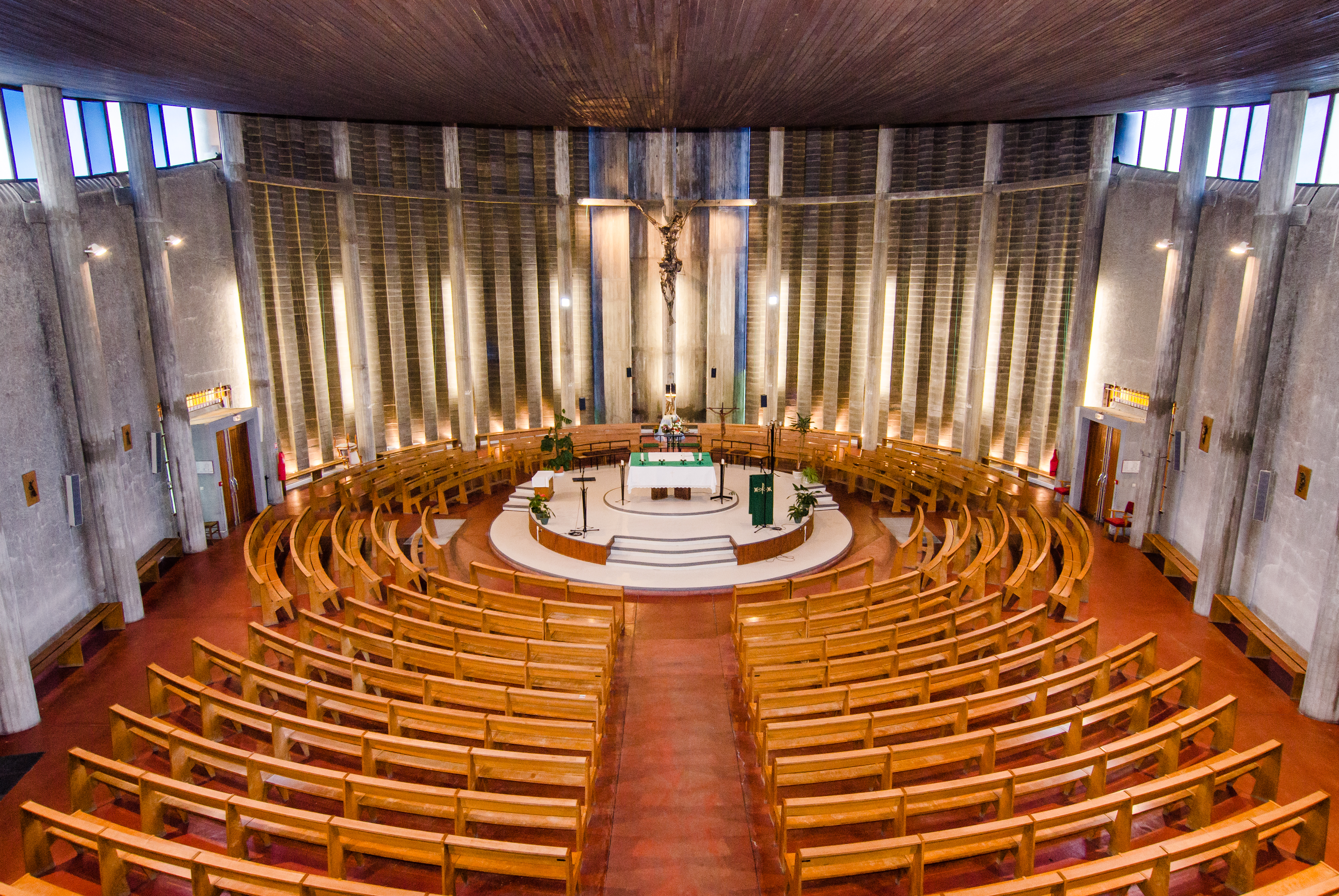 Intérieur de l'extension de l'église Saint-Flaive à Ermont